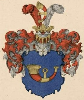 Medemi suguvõsa aadli- ja vabahärravapp